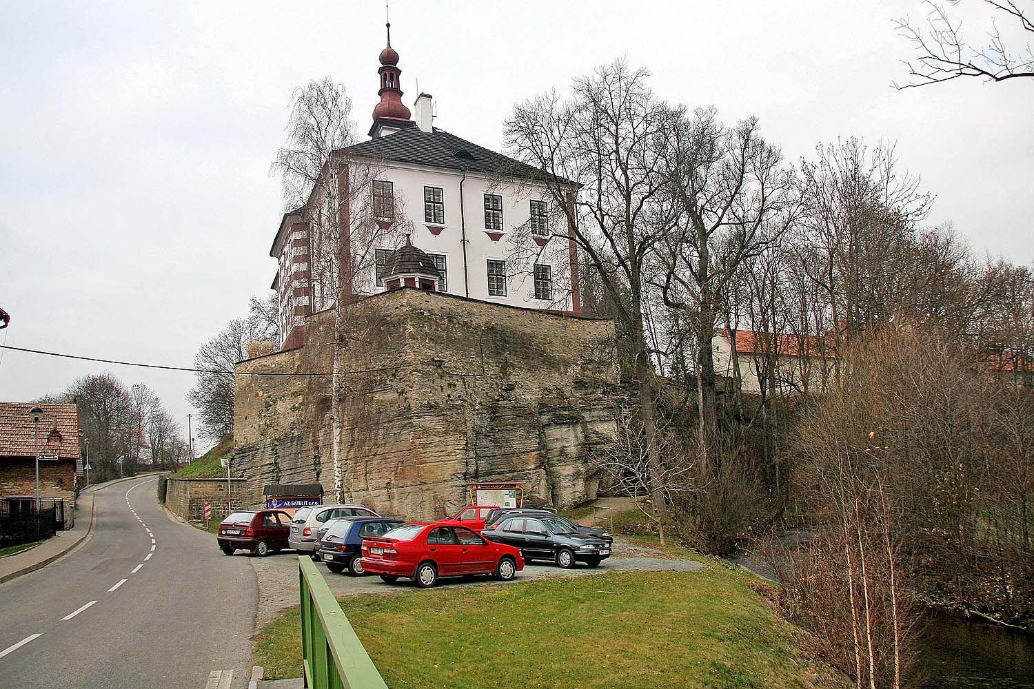 Zámek Skalka v obci Podbřezí, District Rychnov nad Kněžnou